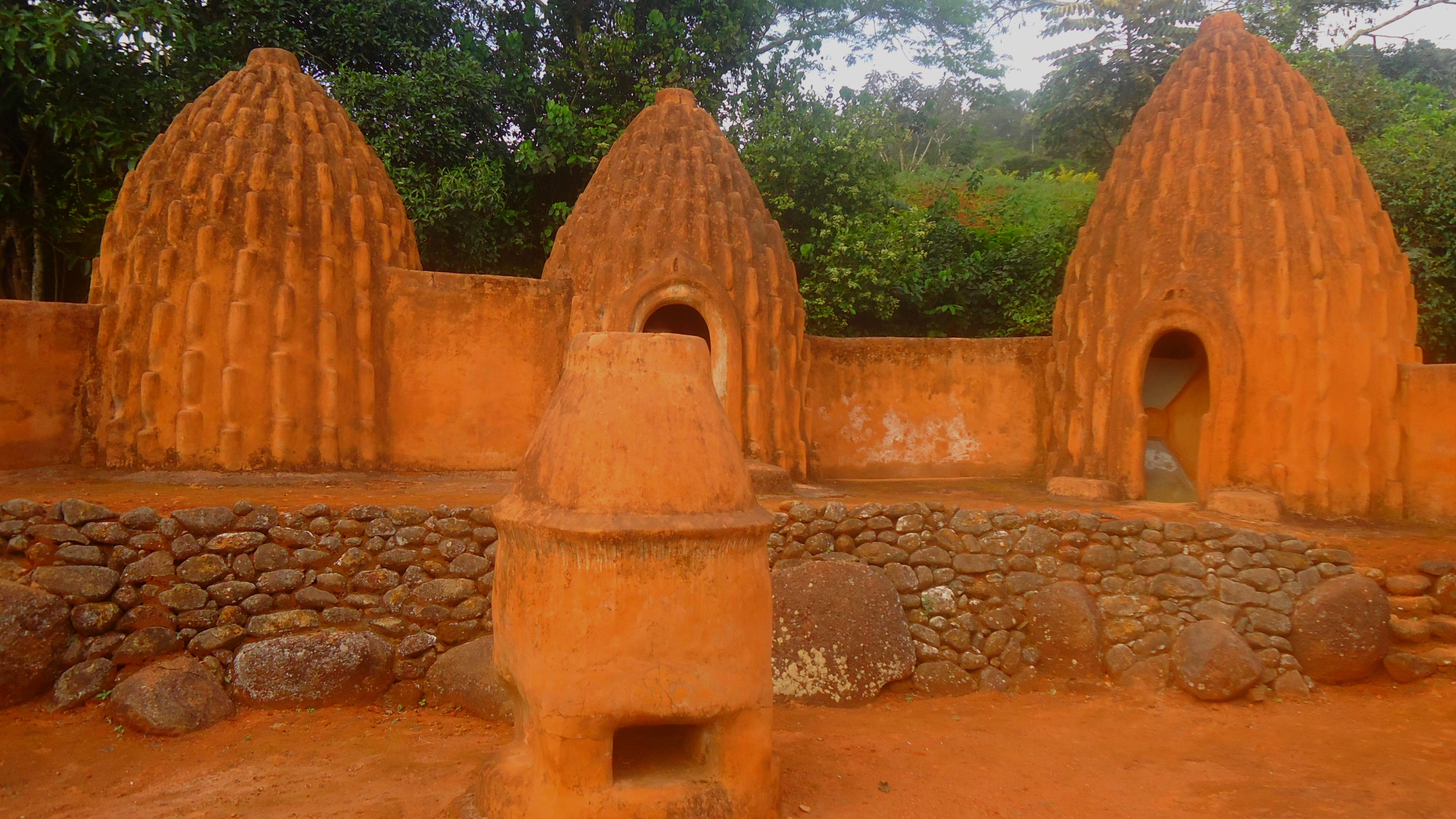 Cette image représente des cases Mousgoum, ce peuple des plaines du Nord-Cameroun du Sud-ouest du Tchad et de l'Est du Nigéria. Faites en boue séchée, elles sont reproduites ici à la Fondation Jean Félicien Gacha à Bangoulap, dans la région de l'Ouest.